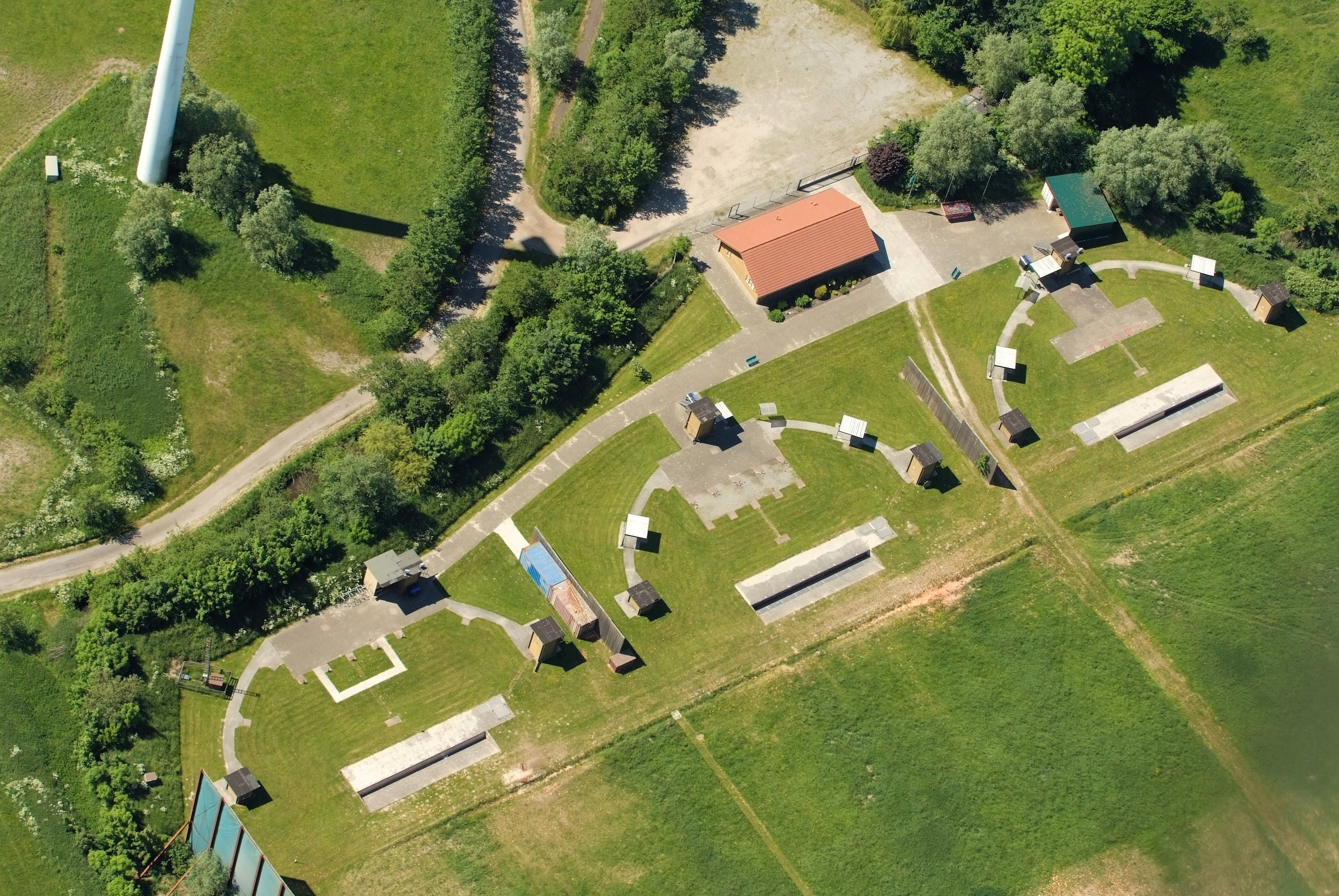 Fotoflug vom Flugplatz Nordholz-Spieka über Cuxhaven und Wilhelmshaven